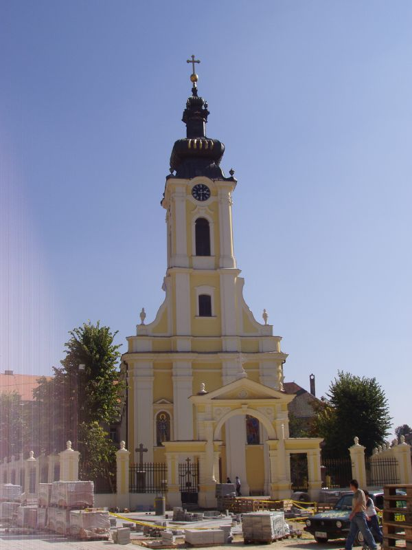 crkva Sv. Dimitrija - cathedral Sv. Dimitrija in Sremska Mitrovica, Serbia